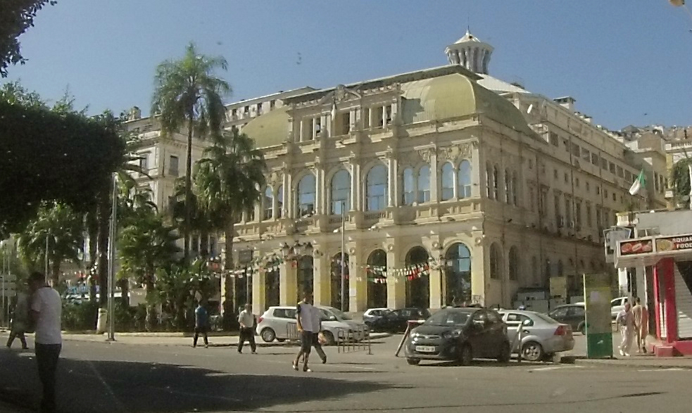 Theatre National Algérie Mahieddine Bachtarzi